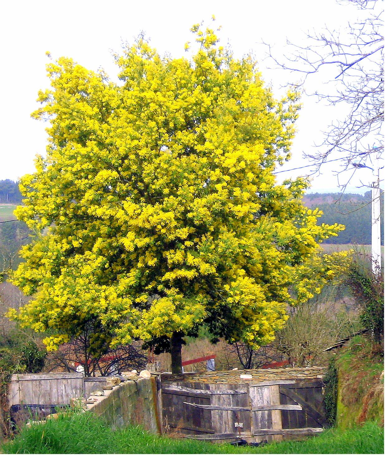 Paisaxe de Lugo con acacia